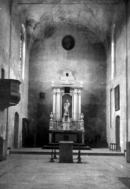 Беларуская (тарашкевіца): Ворша (Vorša), вуліца Дамініканская (vulica Daminikanskaja). Касьцёл Сьвятога Антонія Падуанскага і кляштар францішканаў